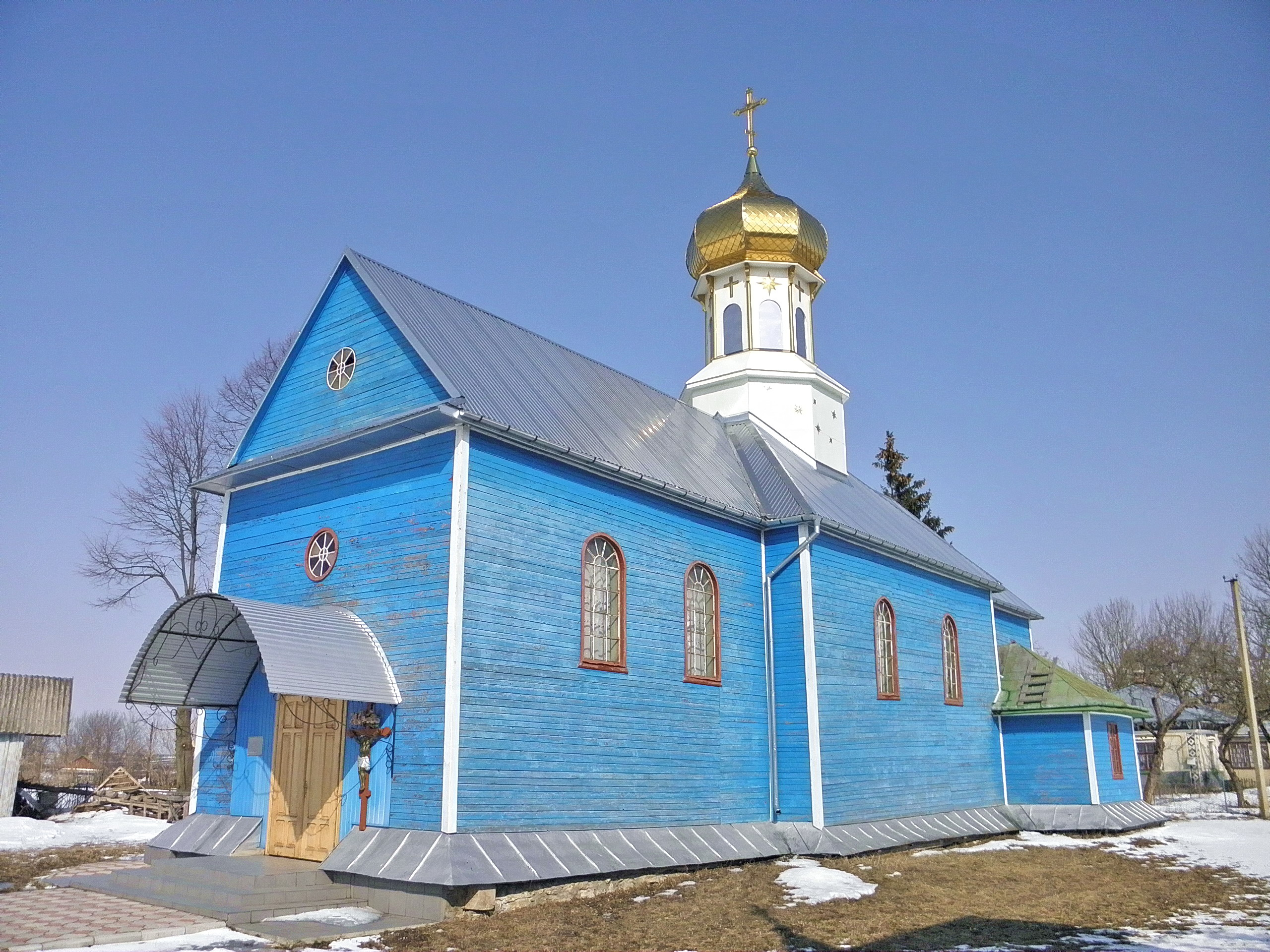 Церква Покрови Пресвятої Богородиці (дерев'яна) в селі Медині Підволочиського району Тернопільської області.